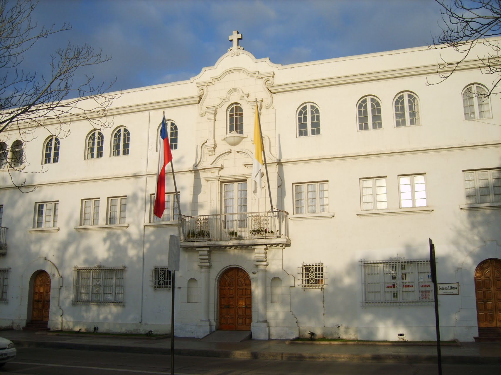 Edificio del Arzobispado de La Serena.